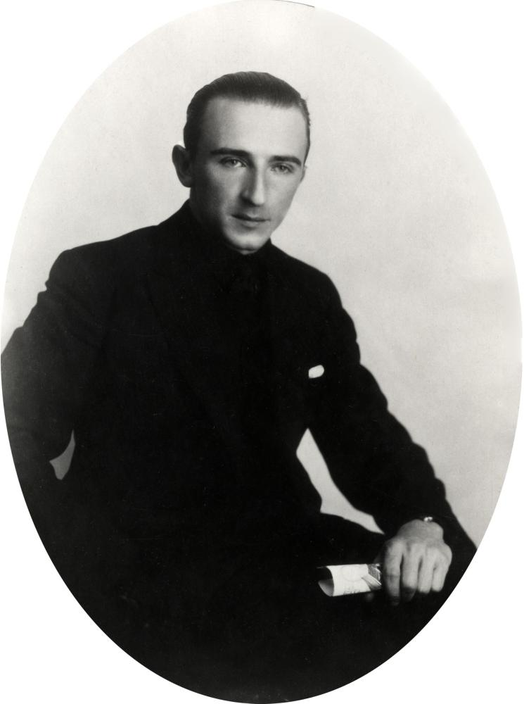 Portret van Jan Baars, één van de eerste Nederlandse fascistenleiders. Nederland, november 1931.